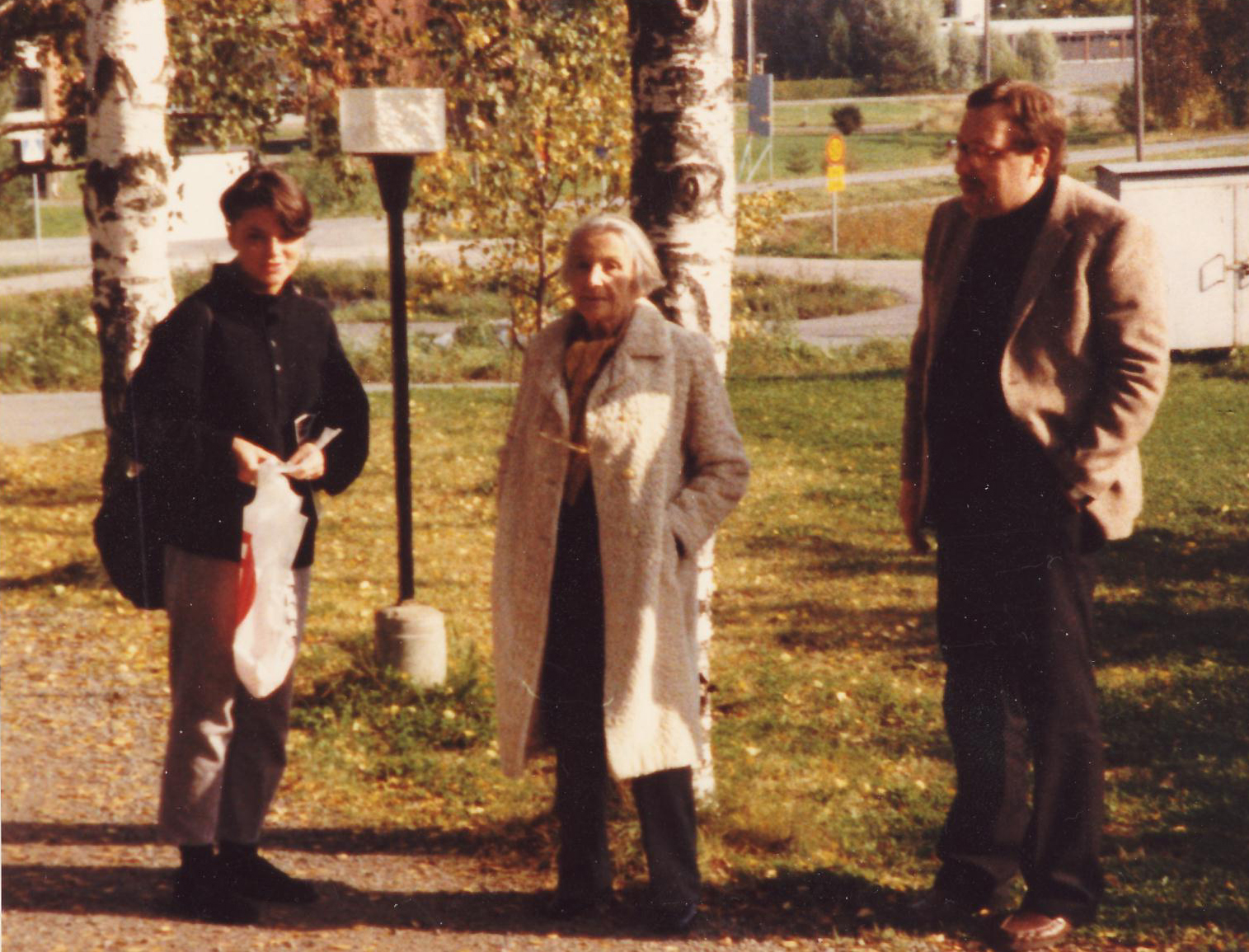 Kirjalija Nathalie Sarraute noin vuonna 1983 Kirjalija Nathalie Sarraute noin vuonna 1983